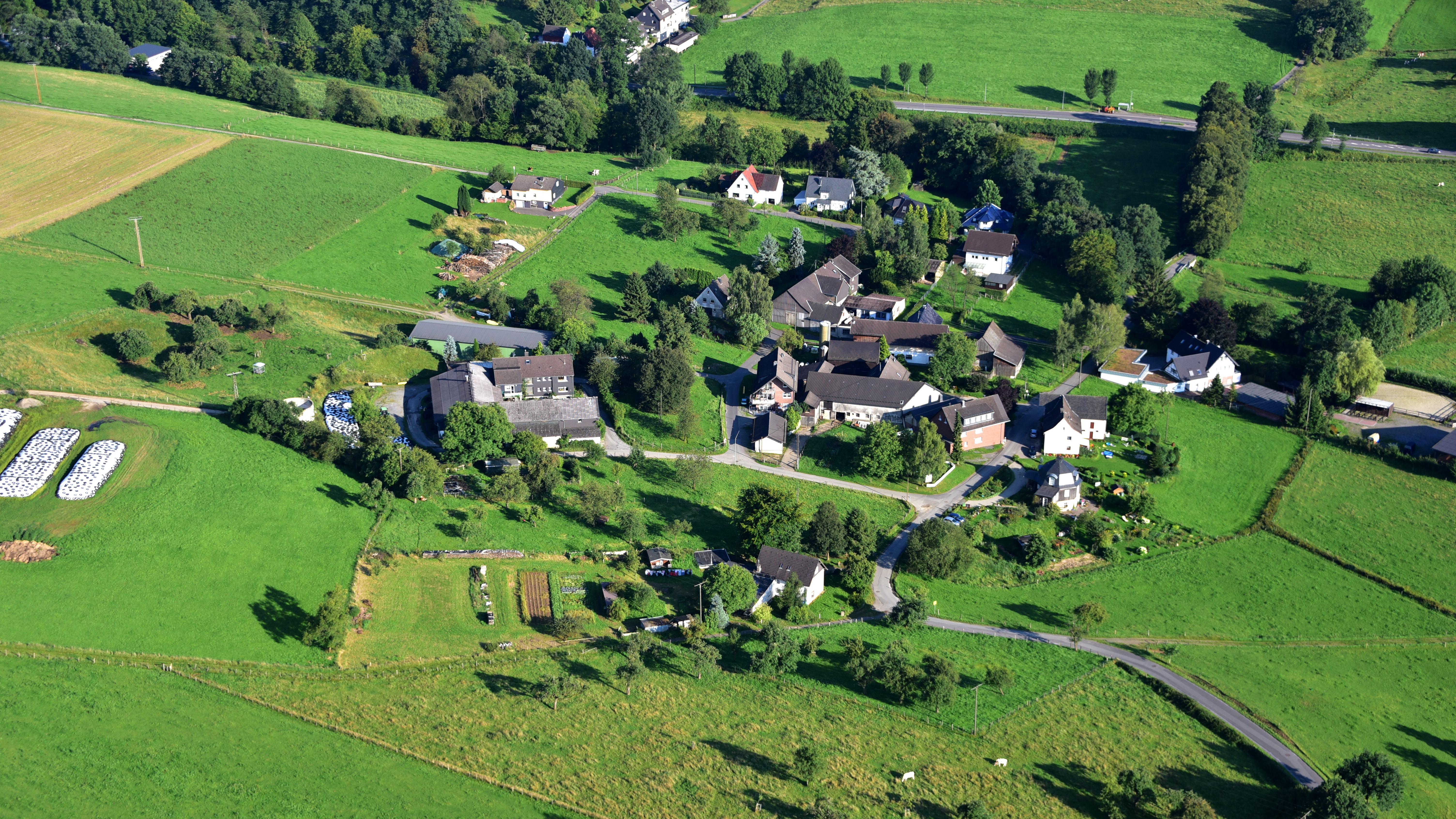 Ruh, Luftaufnahme (2017)